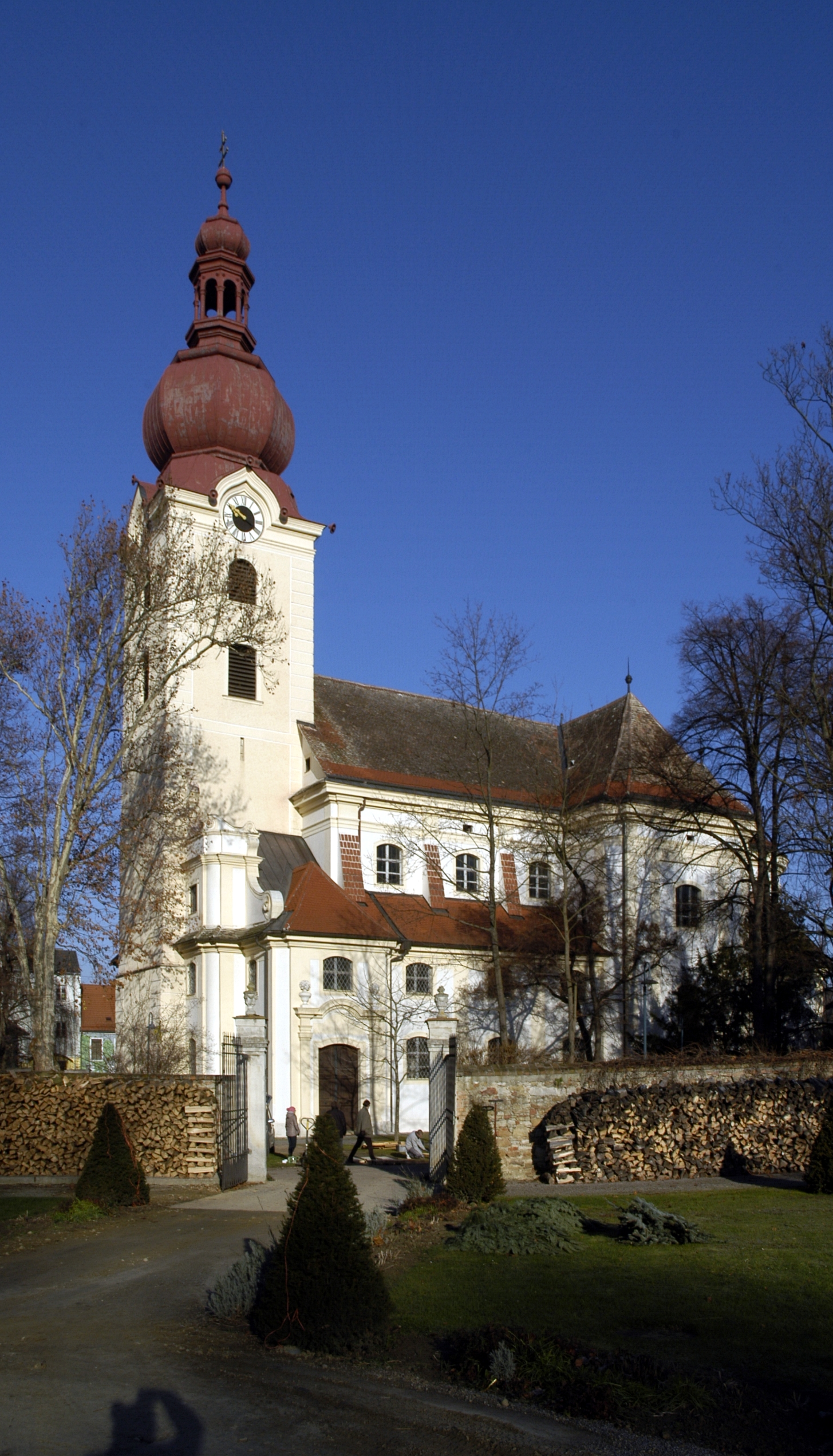 Ansicht von Süden